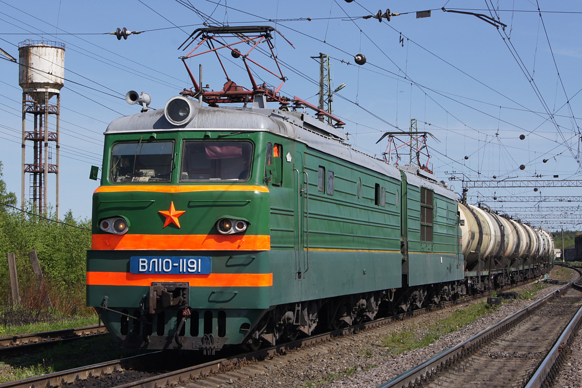 С завода поступил в депо Иркутск-Сорт. (11.1973 г.) 1980 — передан в депо Львов-Запад. 1982 — передан в депо Мукачево. 1988 — передан в депо Московка. 2009(?) — передан в депо Омск. 05.2011 — передан в депо Волховстрой. КР 07.1987 г.